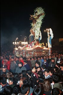 Foto de la procesion del Señor de Luren